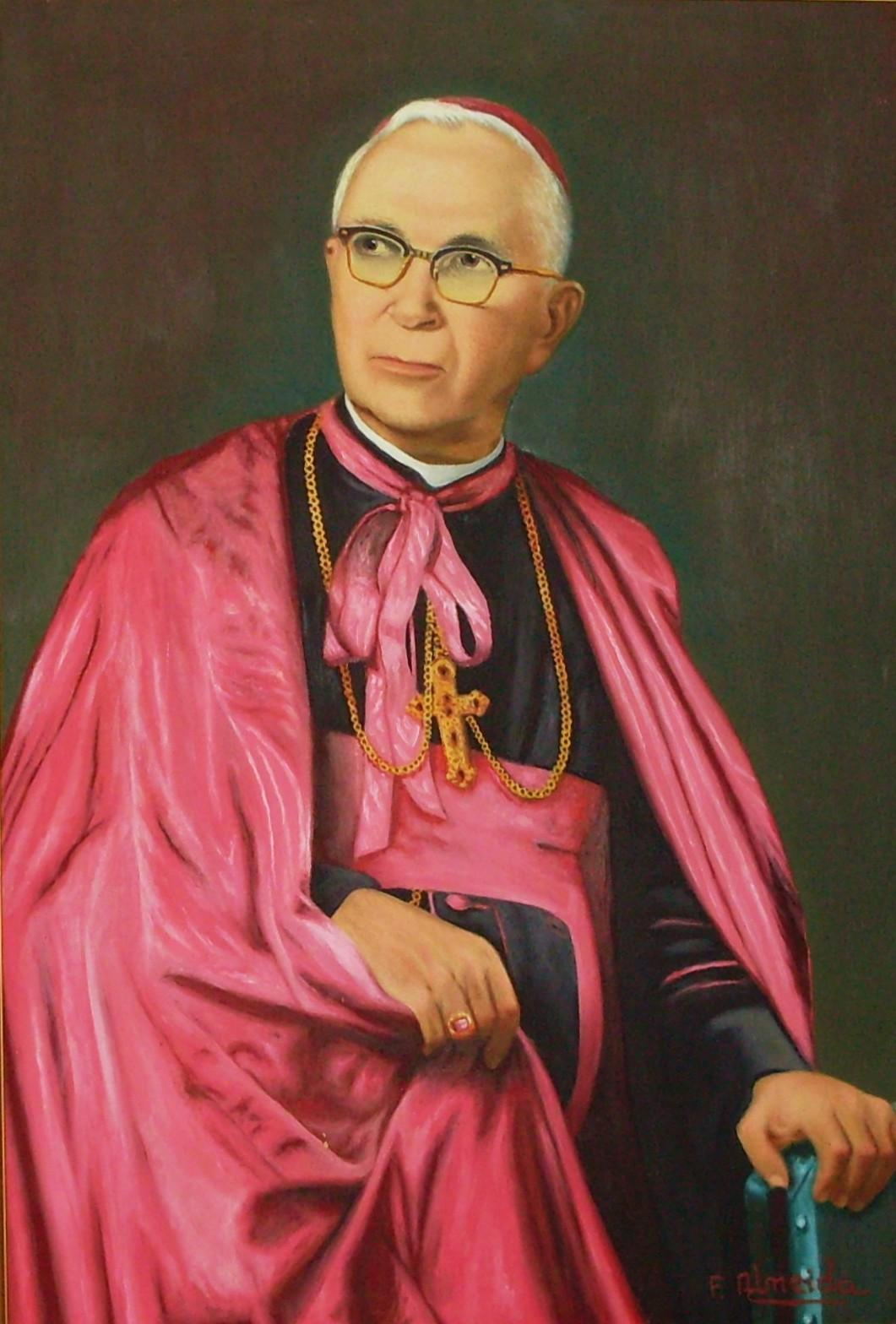 D. Aureliano Matos. [óleo sobre tela] / Marcio Mendonça. Pintura exposta no Museu da Diocese de Limoeiro do Norte